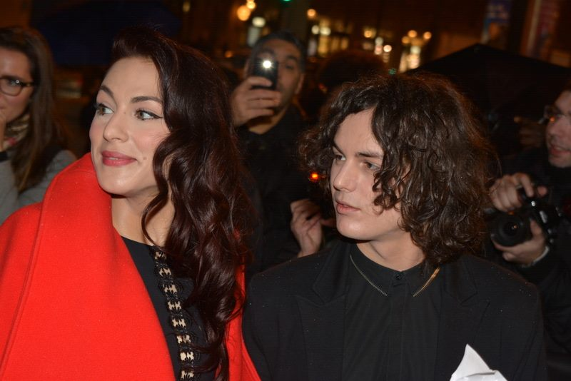 Haylen et Côme à la cérémonie des Globes de cristal